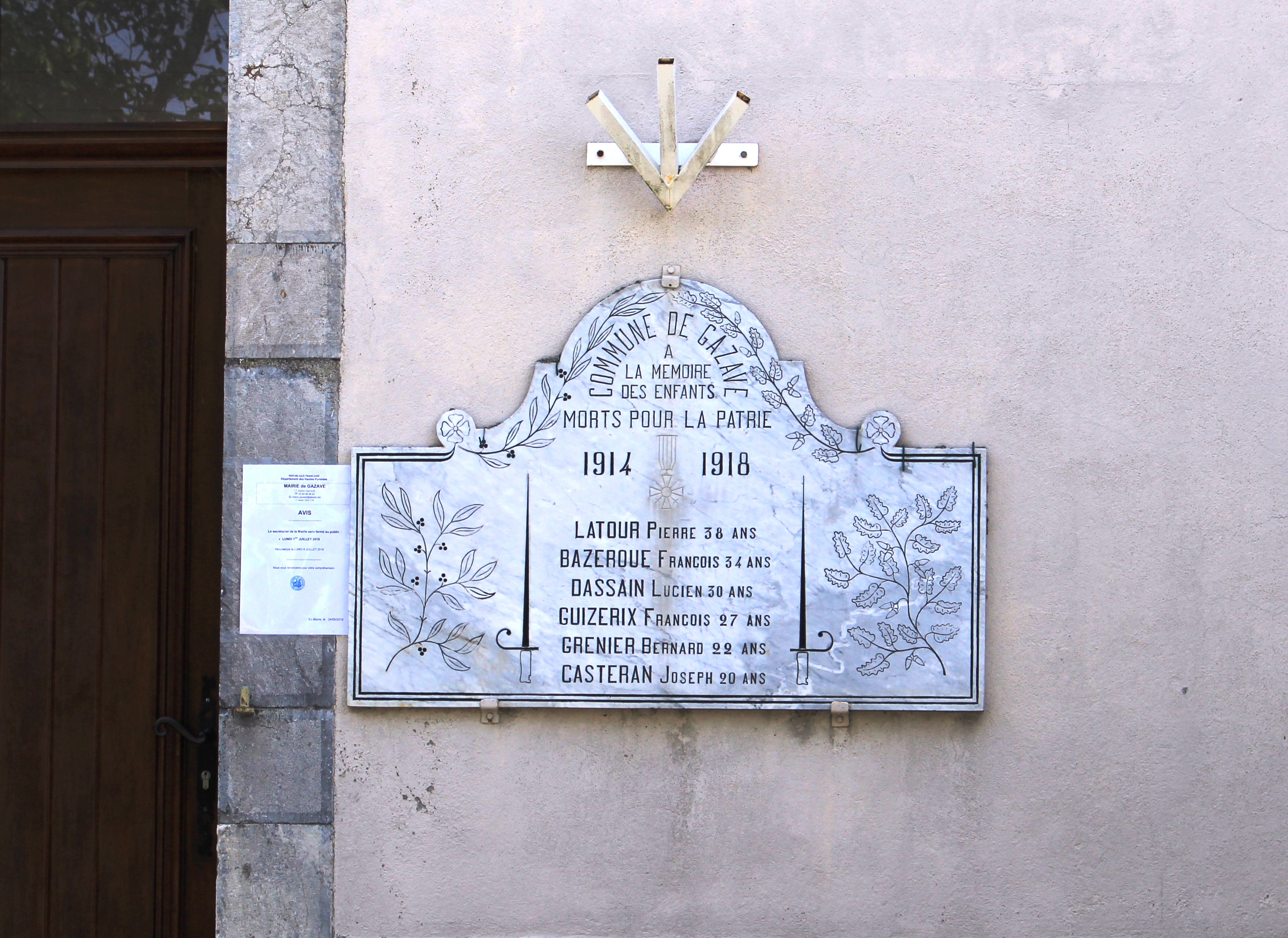 Monument aux morts de Gazave (Hautes-Pyrénées)